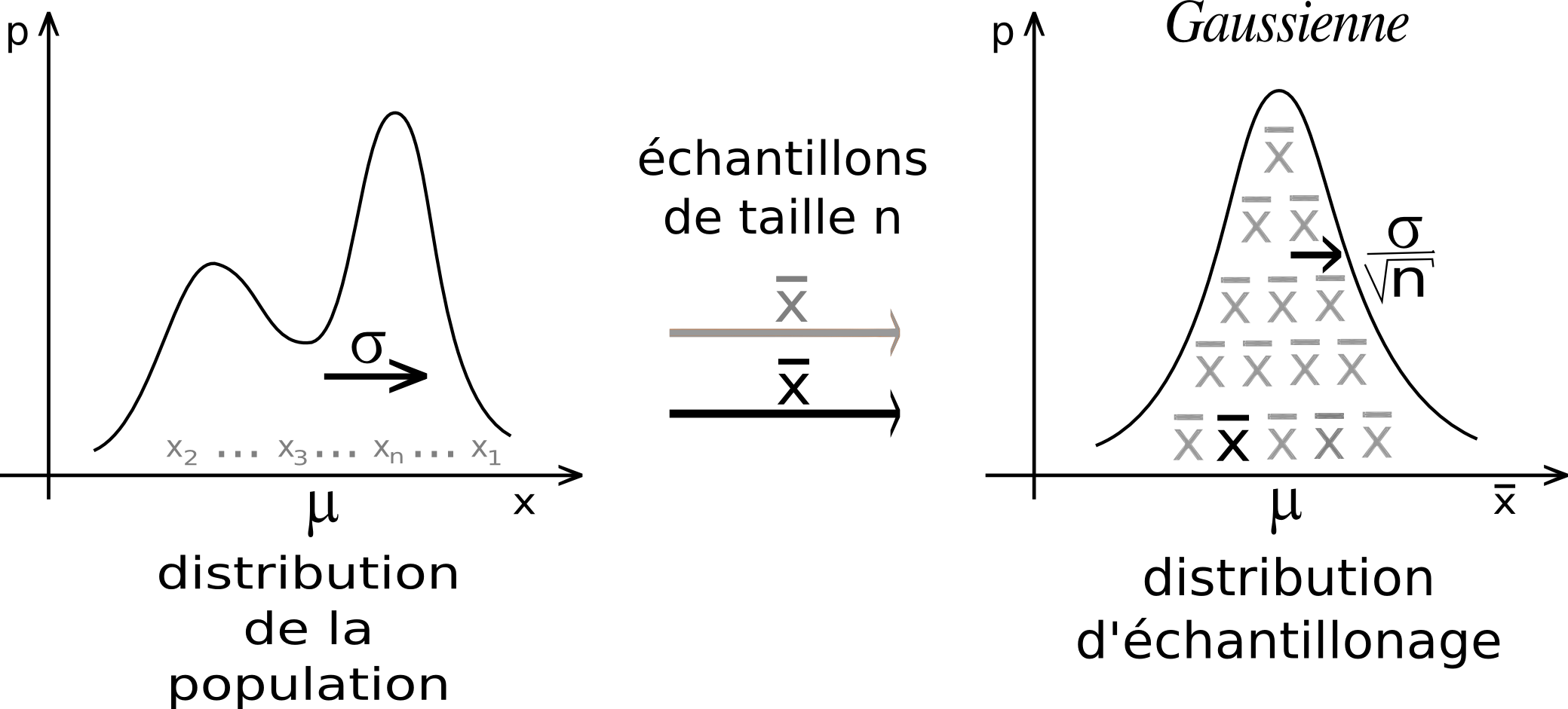 Illustration du théorème central limite.